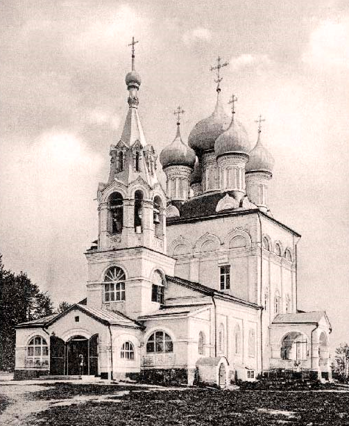 Церковь Сретения Владимирской иконы Владимирской духовной семианарии